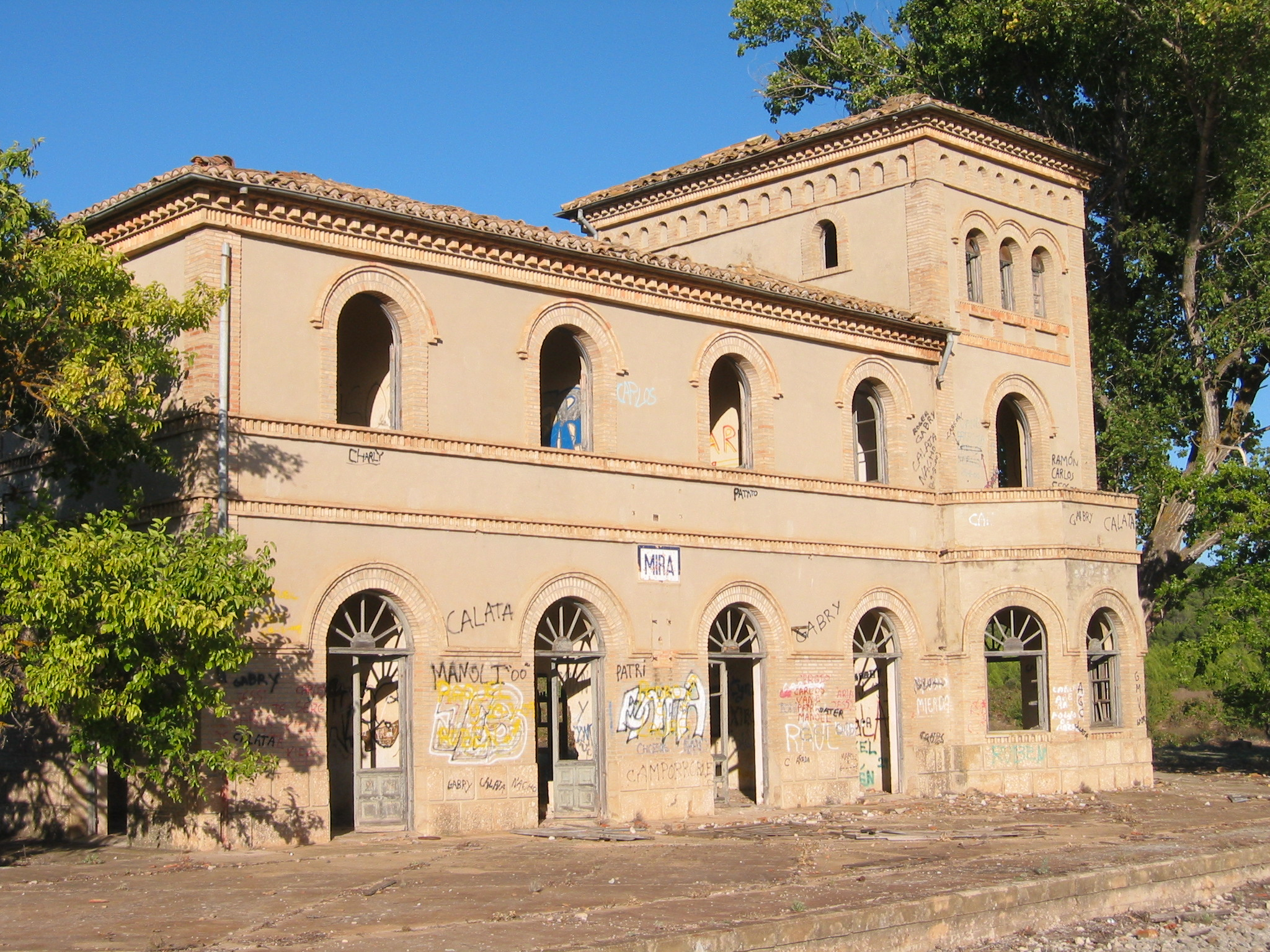 Estación de Mira